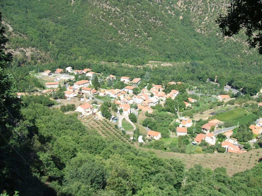 Casteil (Pyrénées-Orientales, France) : vue générale du village depuis la route d'accès à l'abbaye Saint-Martin du Canigou